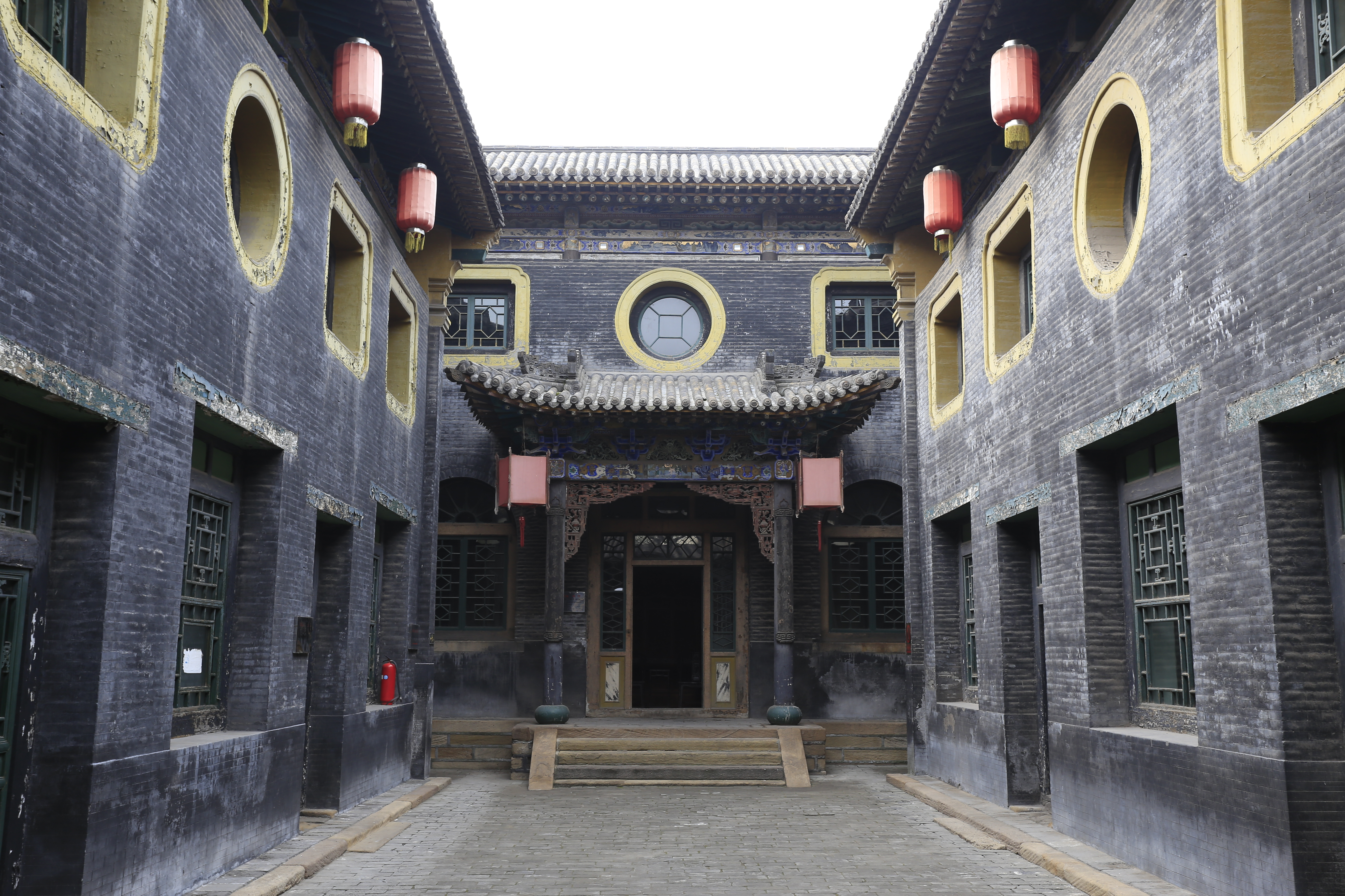 太谷孔祥熙旧居（孔家大院） —— 第二进院